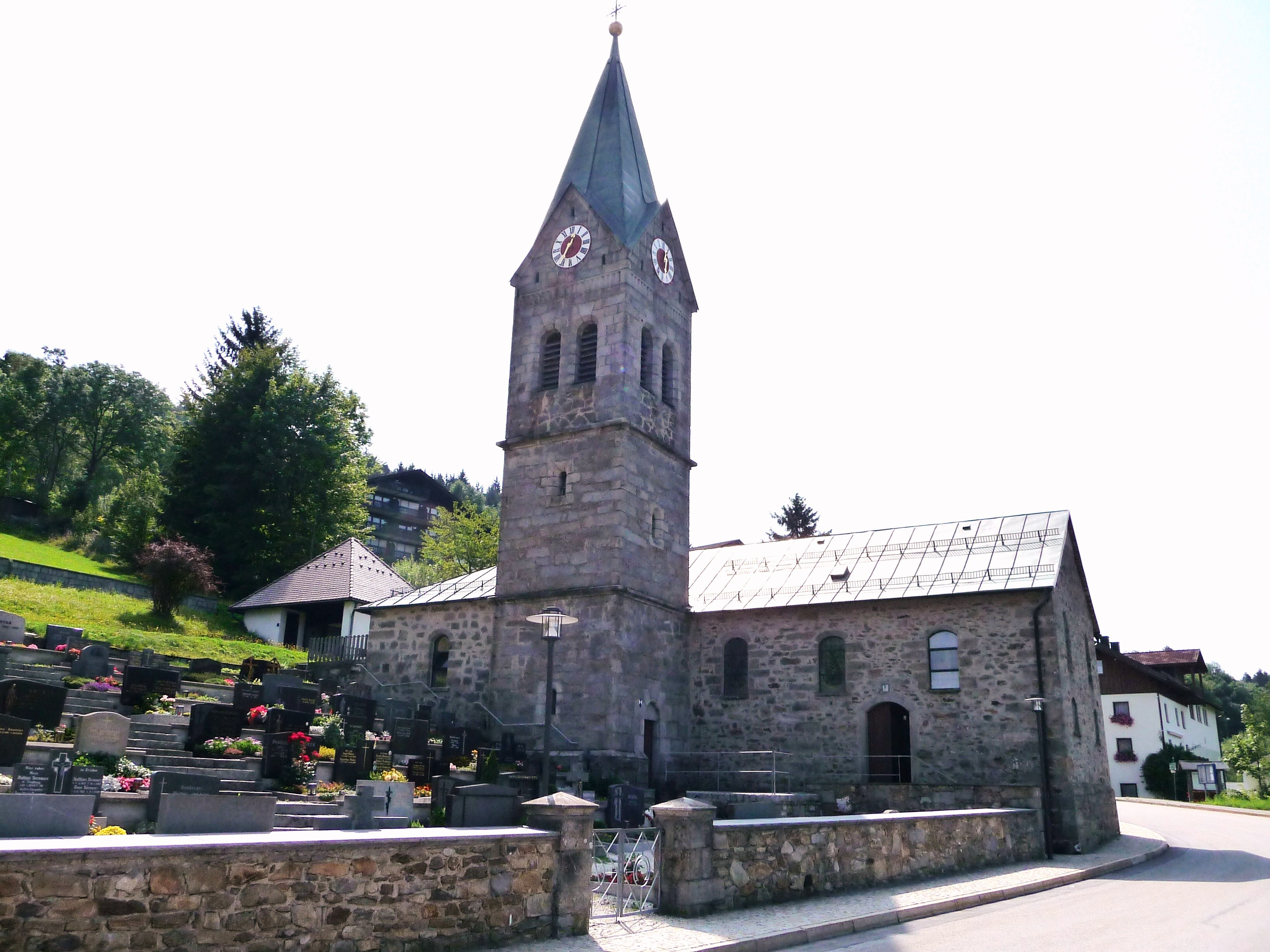 Die Pfarrkirche Maria Himmelfahrt in Langfurth, Gemeinde Schöfweg